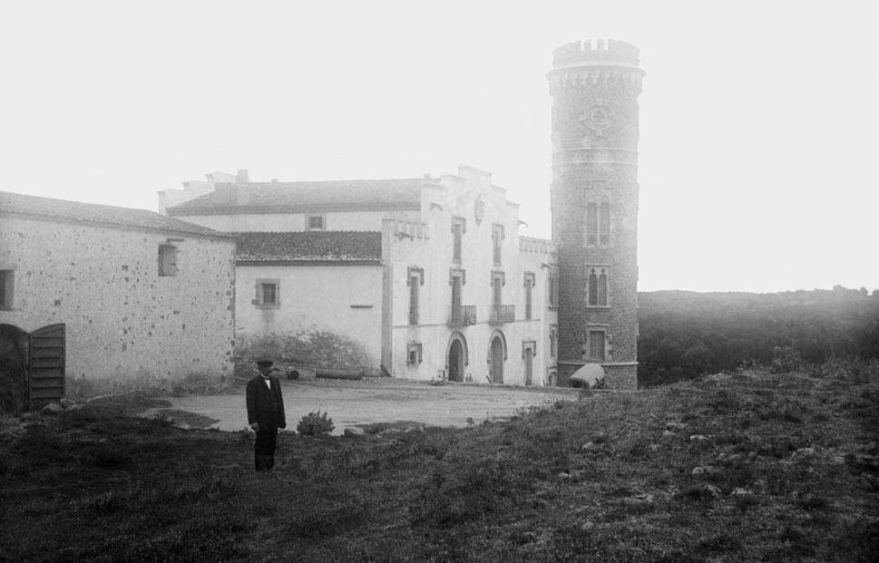 Imatge